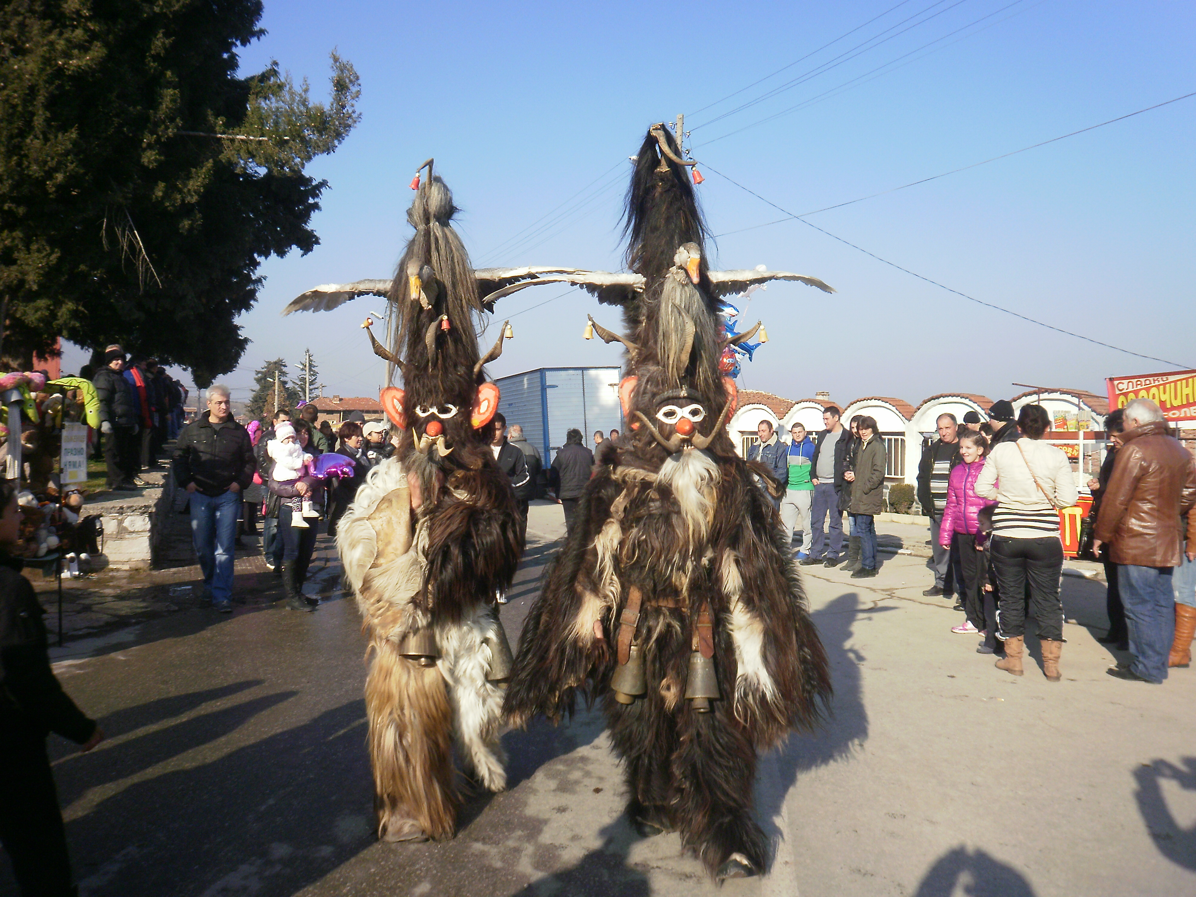 Кукери във Варвара, област Пазарджик, 1 януари 2013 г.